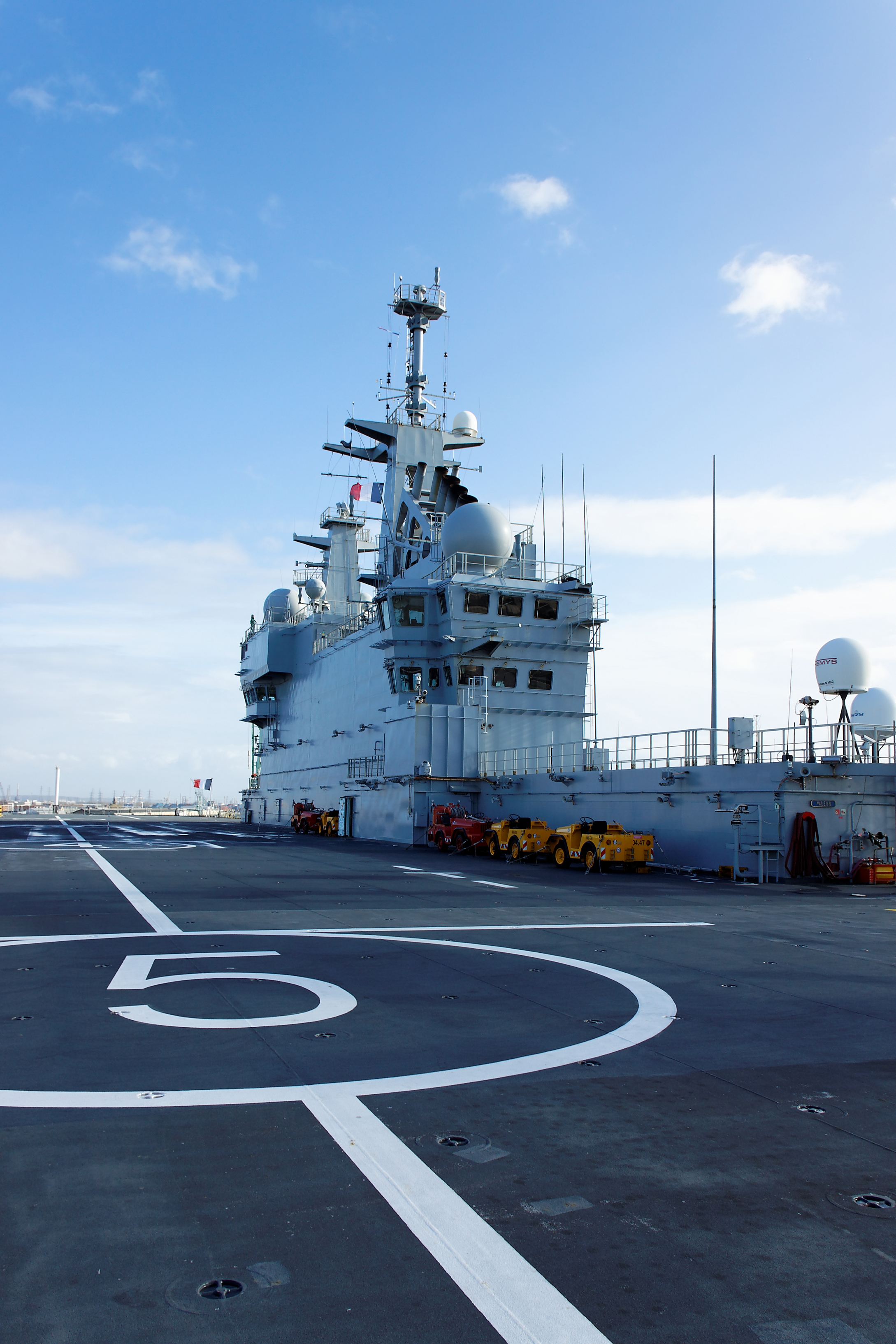 Photograph shot with a Canon EOS 50D, ISO 100, @ 50 mm, F/1.2. DXO Optics Pro 6 software used to enhance the picture. The Mistral was in Le Havre at the moment. Photographie prise avec un Canon EOS 50D, ISO 100, @ 50 mm, F/1.2. Logiciel DXO Optics Pro 6 utilisé pour affiner l'image. Le Mistral est ici en escale de courtoisie dans le port du Havre